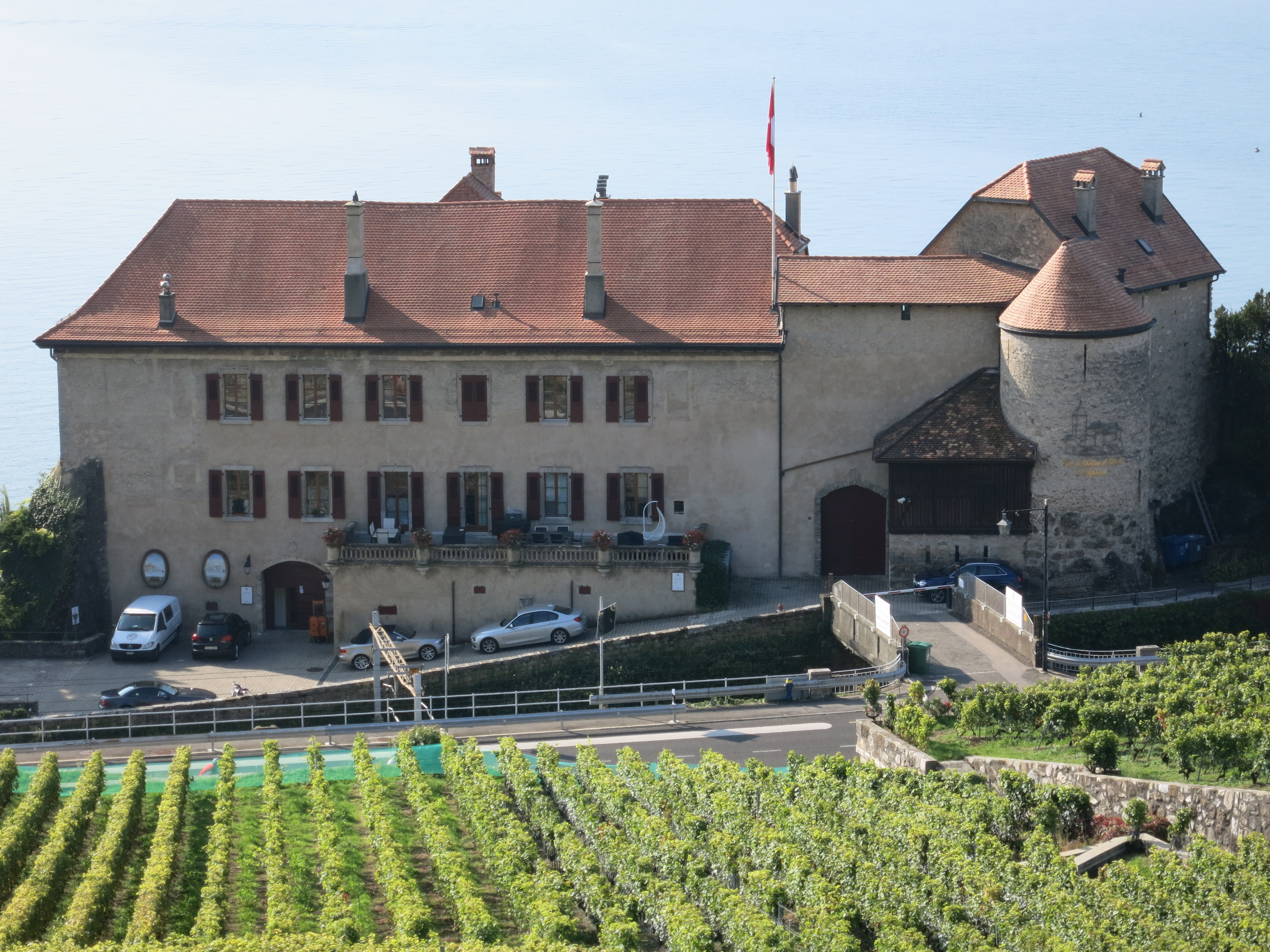 Château de Glérolles, St-Saphorin VD, Schweiz